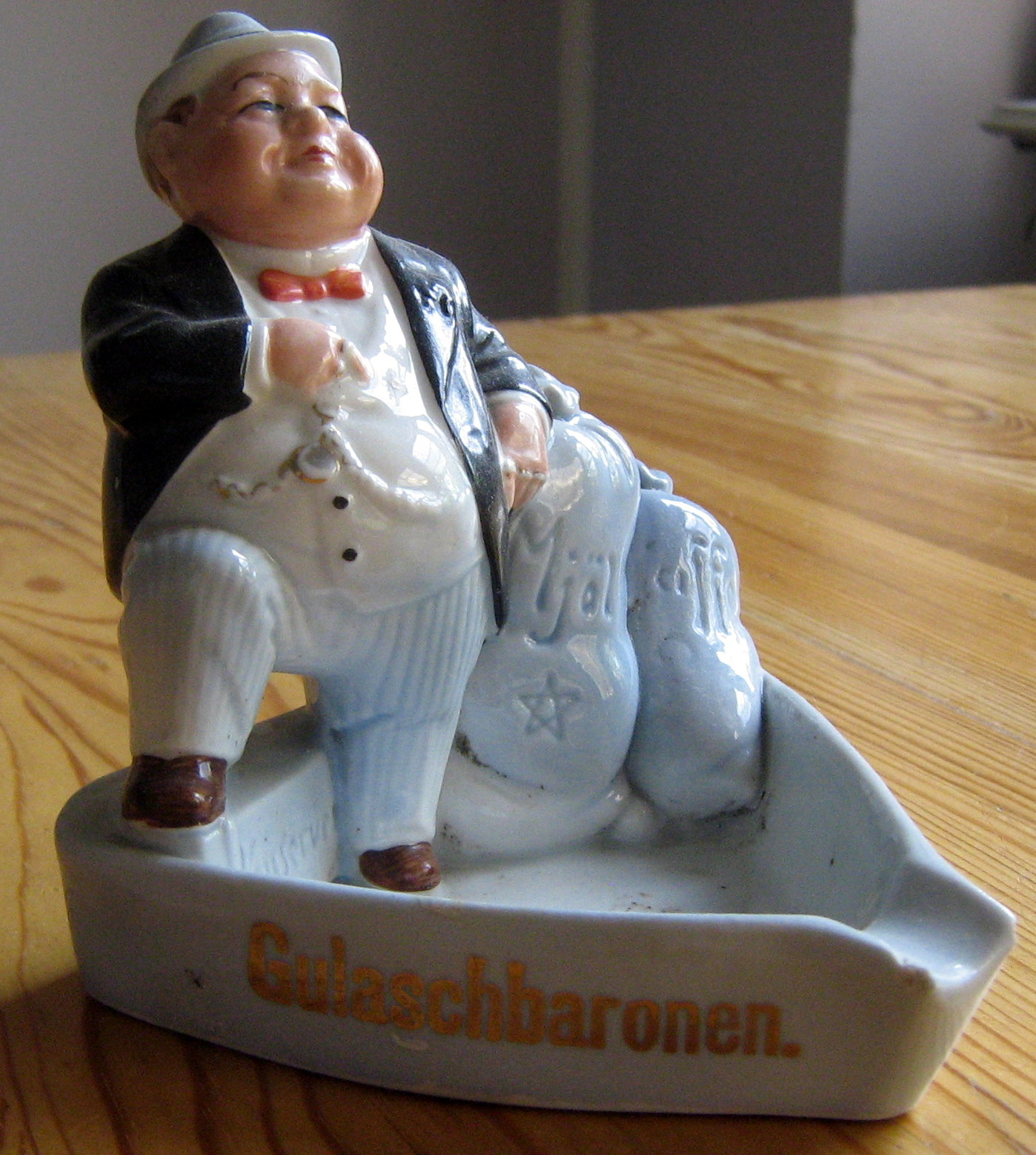 Askfat med "gulaschbaron". Importerat porslin, troligen tillverkat efter svensk beställning i Tyskland 1915-20.